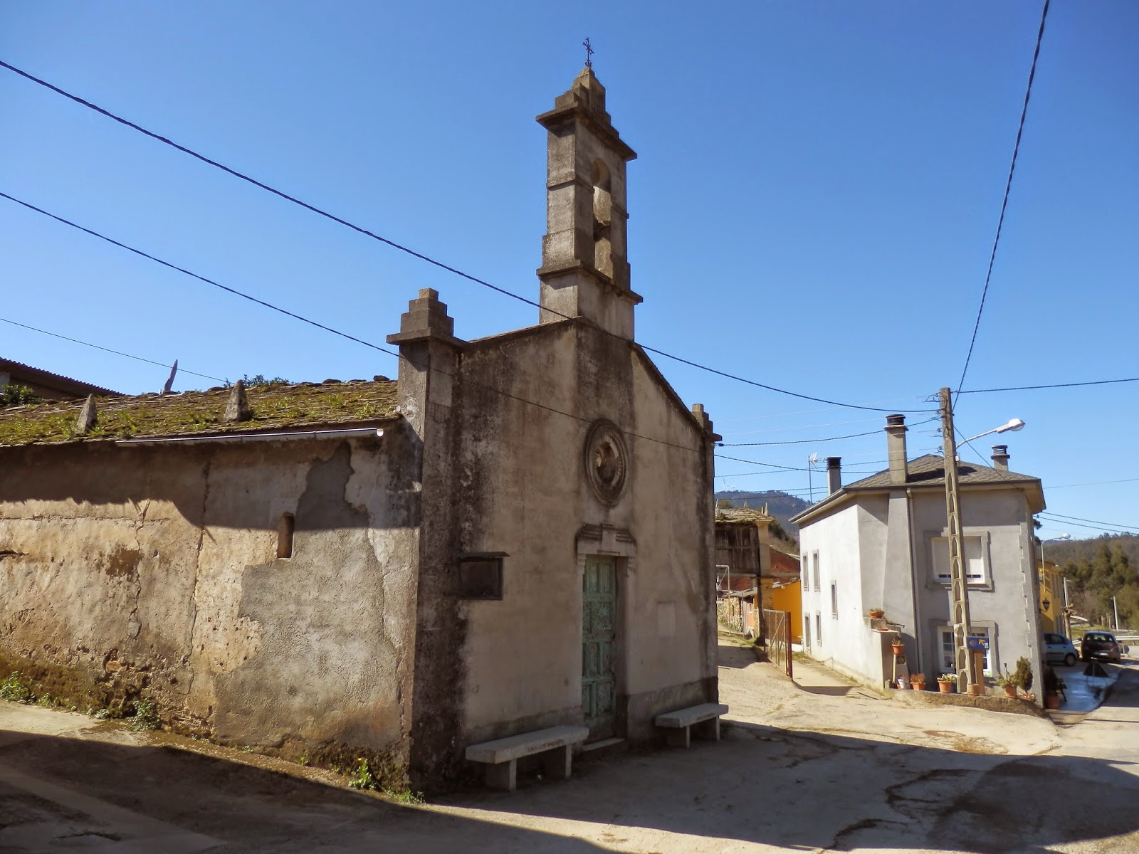 Capeda da Virxe de Guadalupe en Ogrobe, Vilamor, Mondoñedo, España